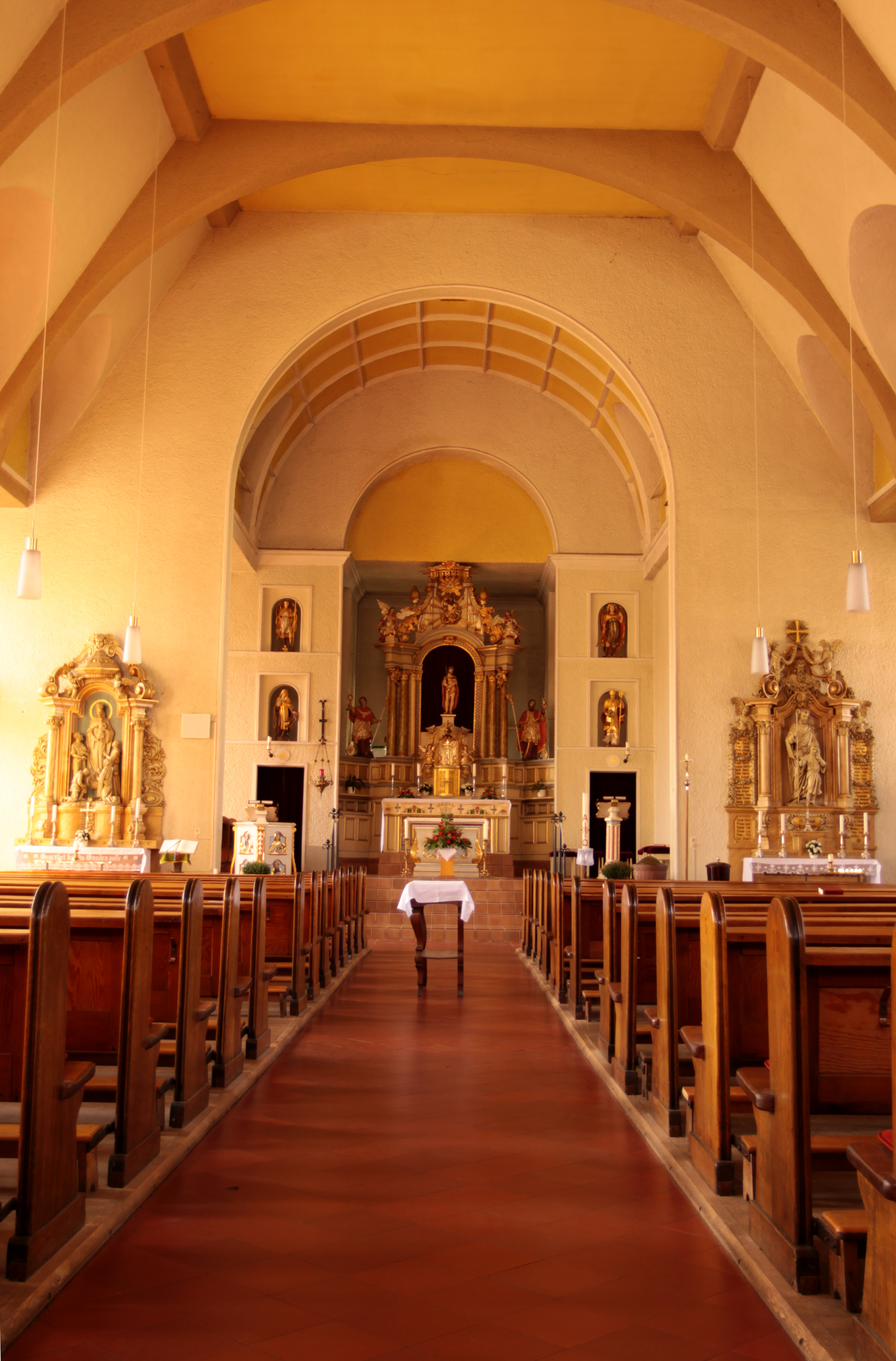 Kirche in Merzig-Bietzen, gebaut 1930-32, Hochaltar mit Seitenaltären von 1731